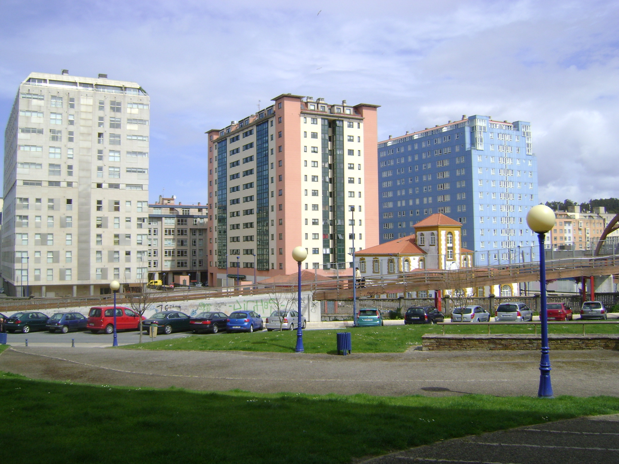 El Burgo, Culleredo, España